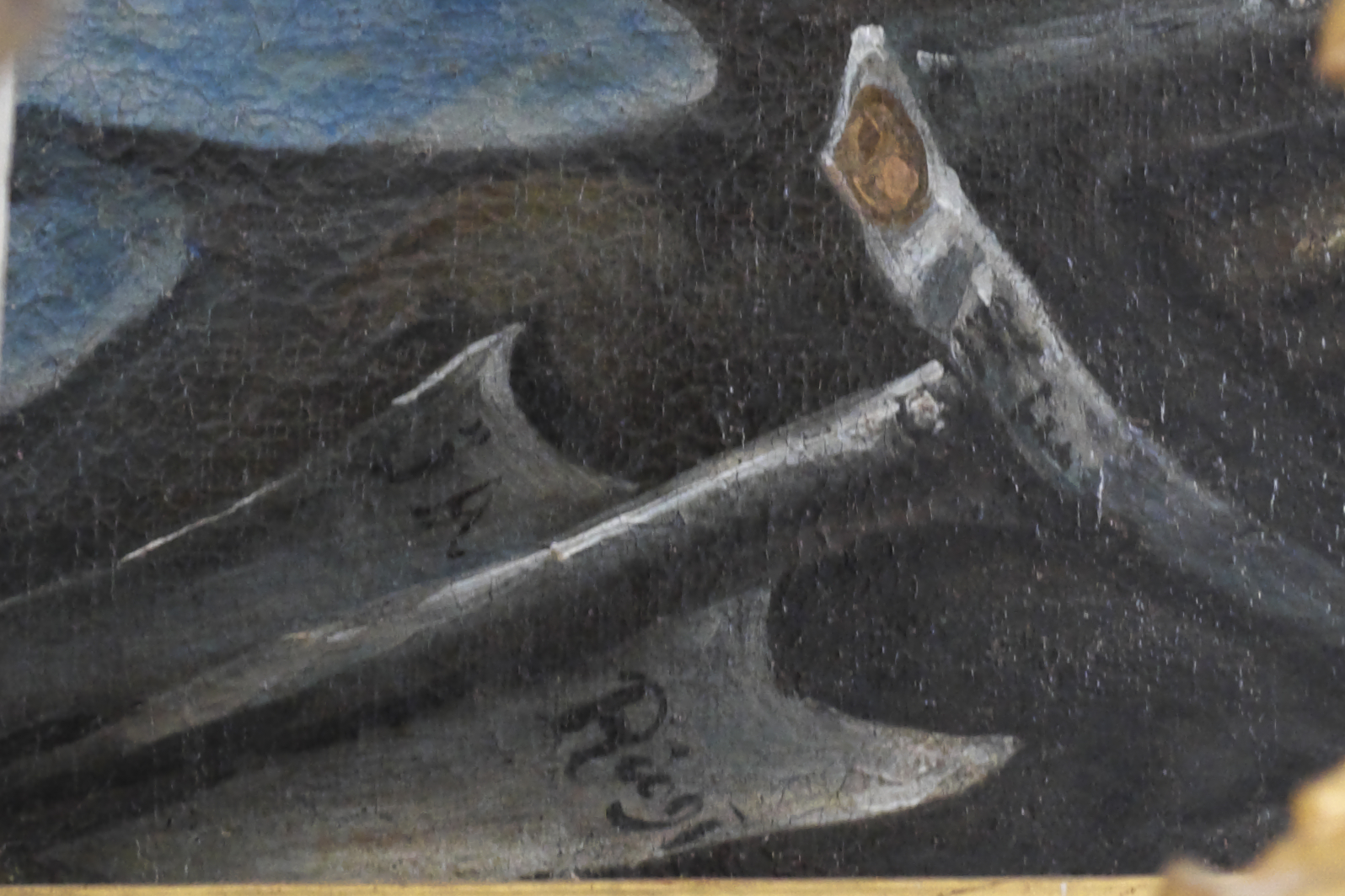 Katholische Filialkirche St. Maria (Maria Himmelfahrt) in Bergkirchen (Jesenwang) im Landkreis Fürstenfeldbruck (Bayern/Deutschland), Hauptaltar, Gemälde von Johann Rieger (Maler); Darstellung: Kreuzigung Christi (Ausschnitt: Signatur)